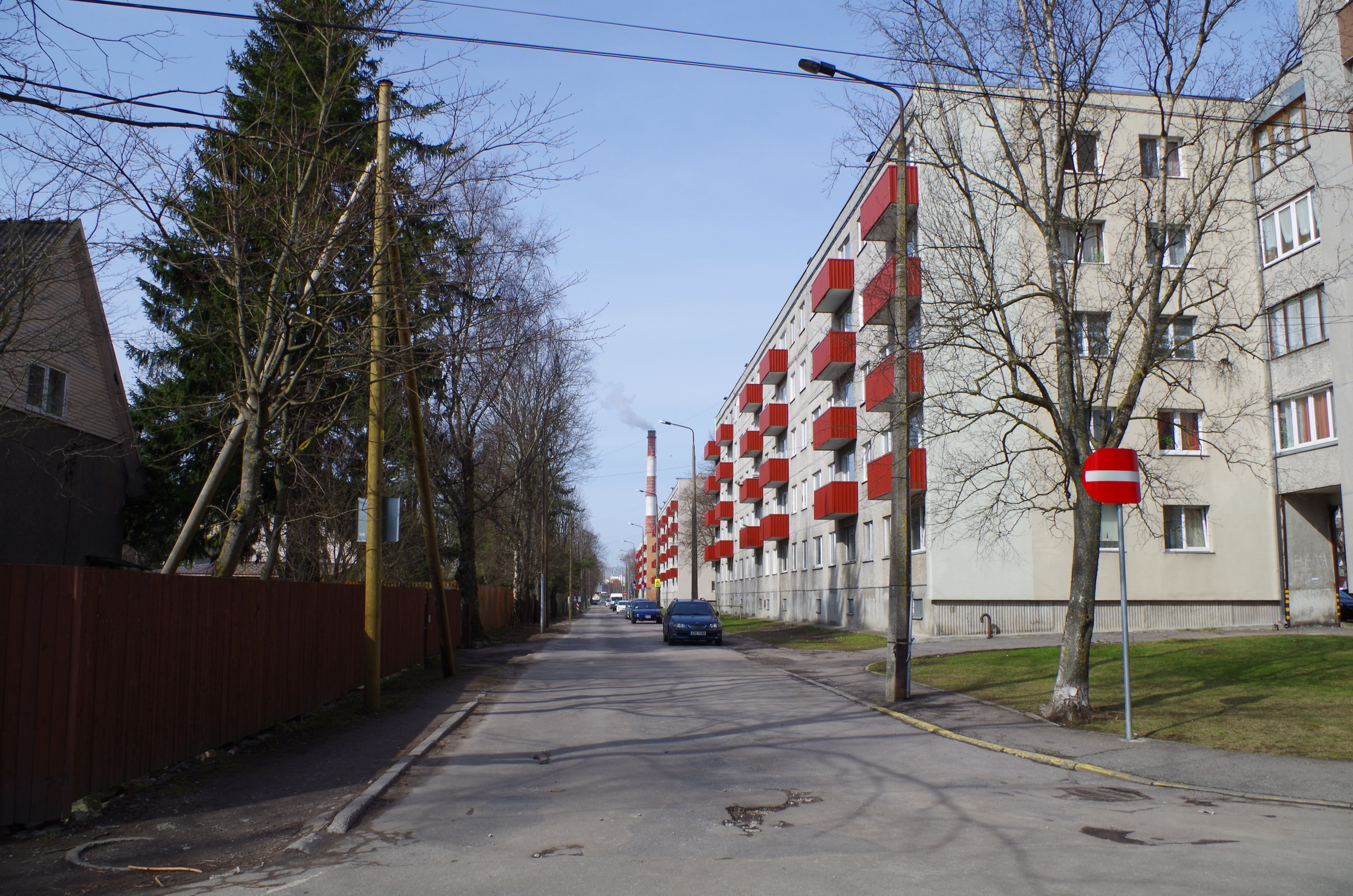 Aprillikuine vaade Kuldnoka tänavale Mooni tänavalt.